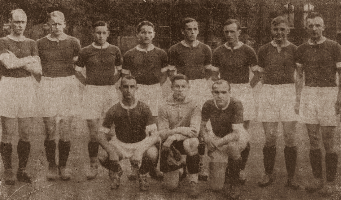 Die Meistermannschaft der Saison 1935/36. (Von links nach rechts: Lachmann, Josefus, Breitkopf, Pischzek, Wilschek, Kubus, Koppa, Richter; kniend: Cyranek, Mettke, Morys)